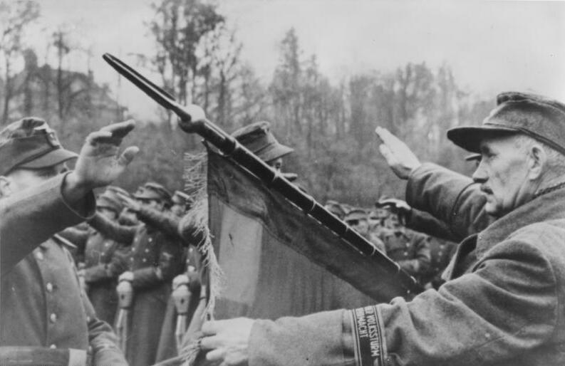 Der Volkssturm tritt an. Der feierliche Schwur auf die Fahne.